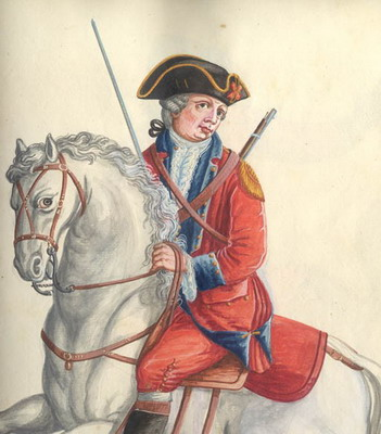 Álbum de aquarelas sobre uniformes militares brasileiros do período colonial brasileiro, provavalmente do século XVIII, de várias regiões do Brasil.